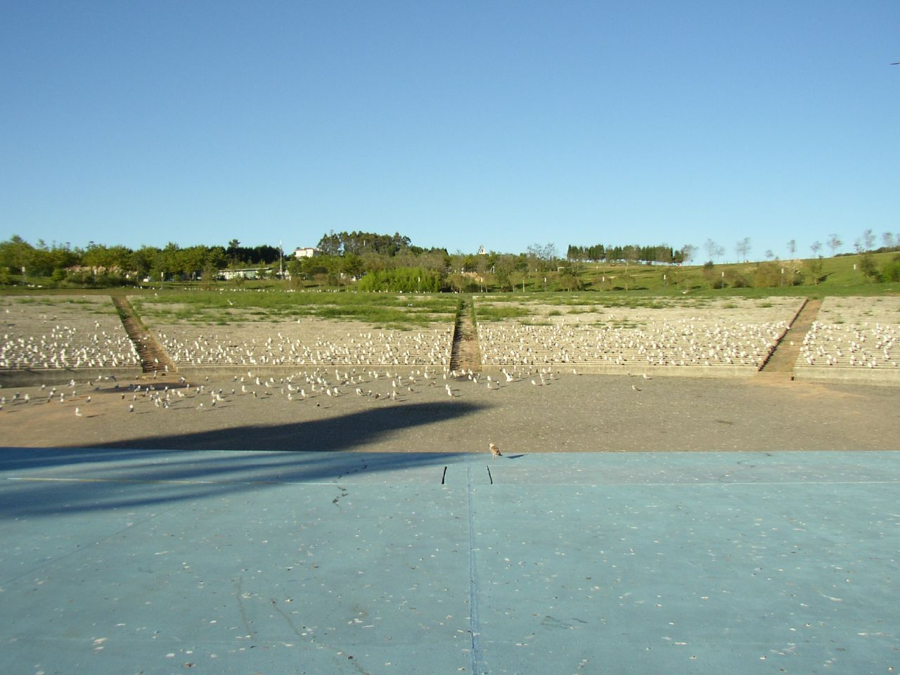 Auditorio del Monte del Gozo (Santiago de Compostela, Galicia, España).